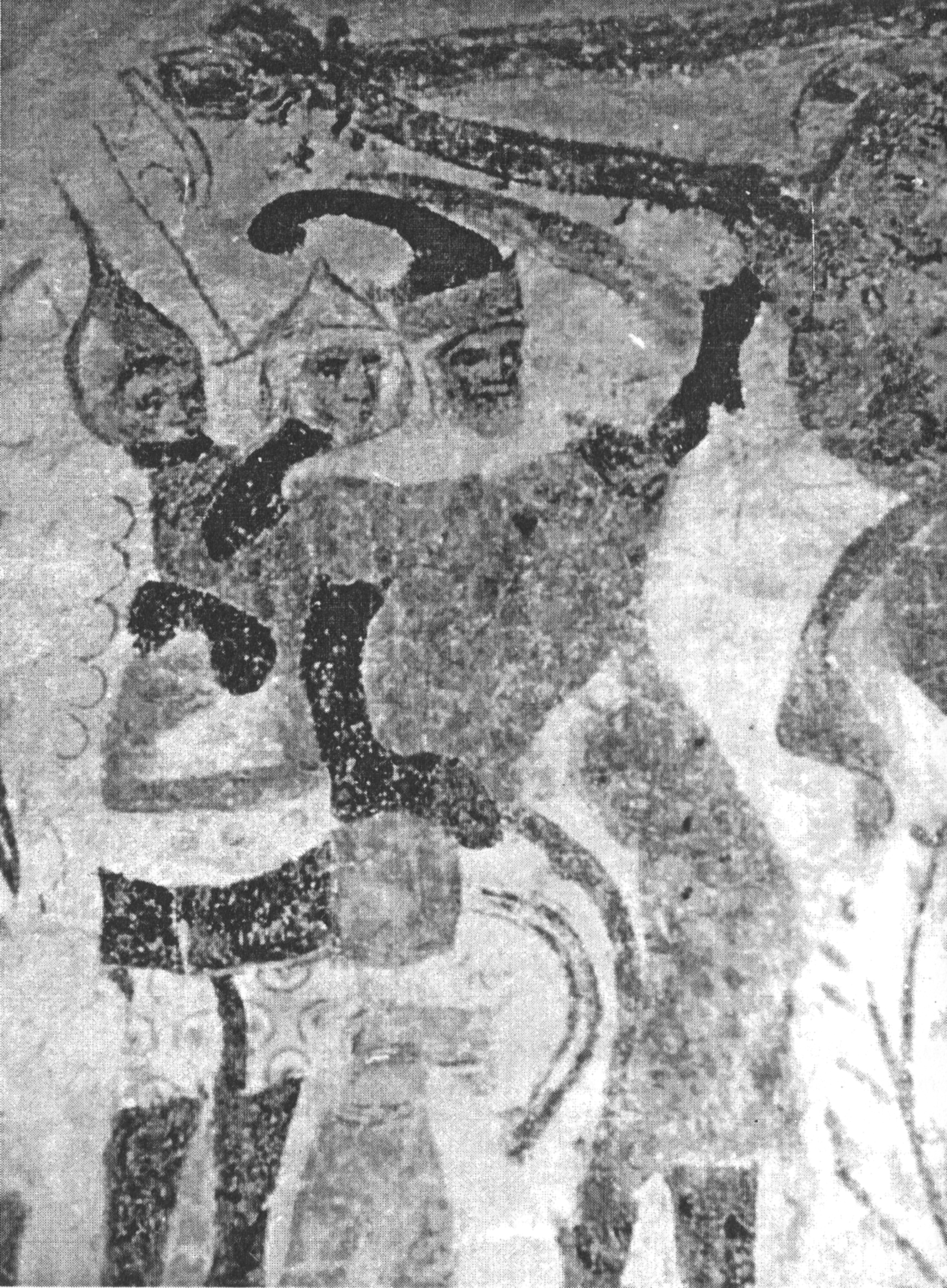 Bildunterschrift: "Eine der wenigen zeitgenössischen Darstellungen der Vitalienbrüder findet sich als Wandmalerei in der Kirche zu Bunge auf Gotland. Gemalt um ca. 1405. Deutlich ist die gotische Kleidung und Bewaffnung der Piraten zu erkennen.